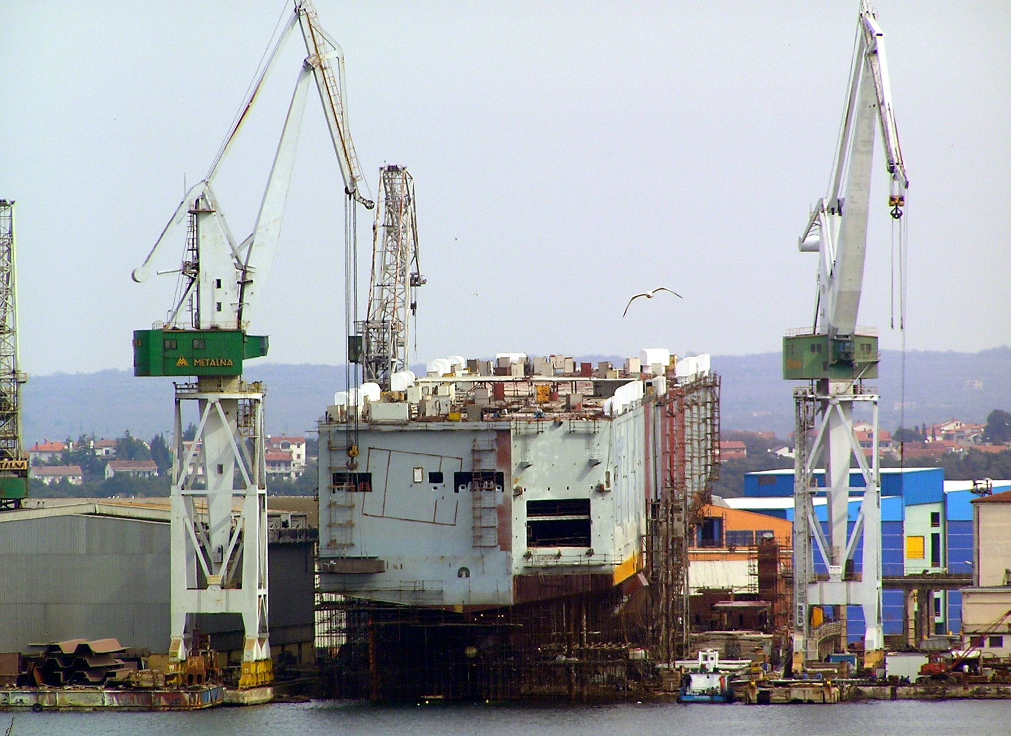 Uljanik shipyard in Pula, Croatia